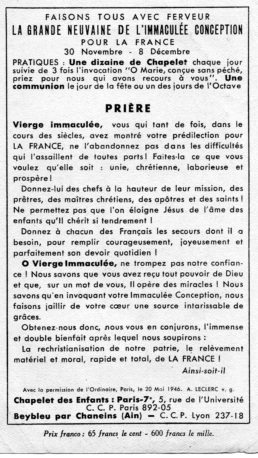 Prière Grande neuvaine de l'Immaculée Conception (verso)